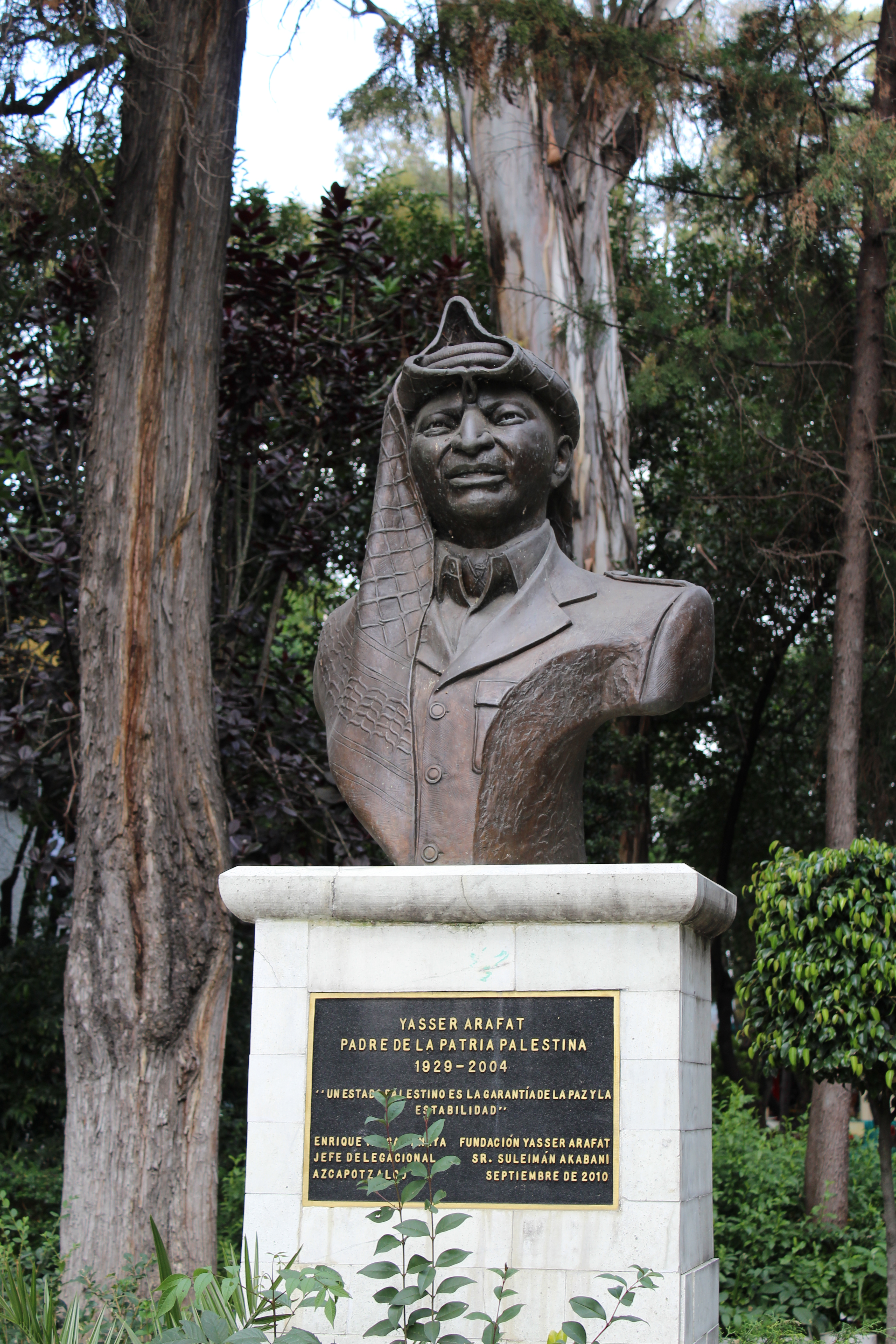 Monumento a Yasir Arafat, Clavería, México.